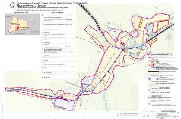 Генеральный план с. Дячкино